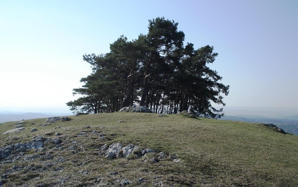 Hohenbol - Gipfel. Der hier sichtbare Teil ist Naturschutzgebiet. Der Hohenbol ist ein im Obermiozän erloschener Schwäbischer Vulkan.